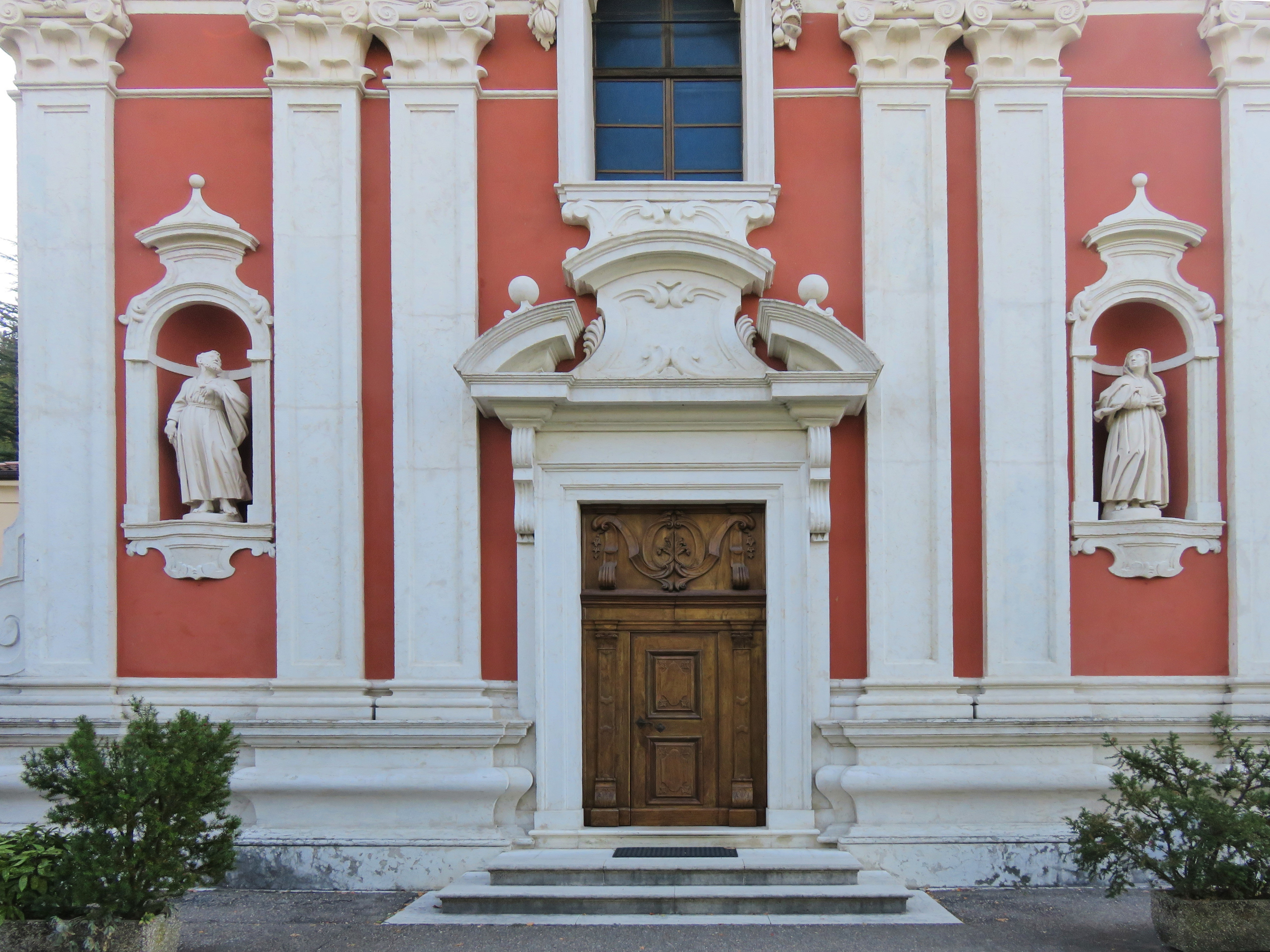 Portale sulla facciata, affiancato da due nicchie con statue